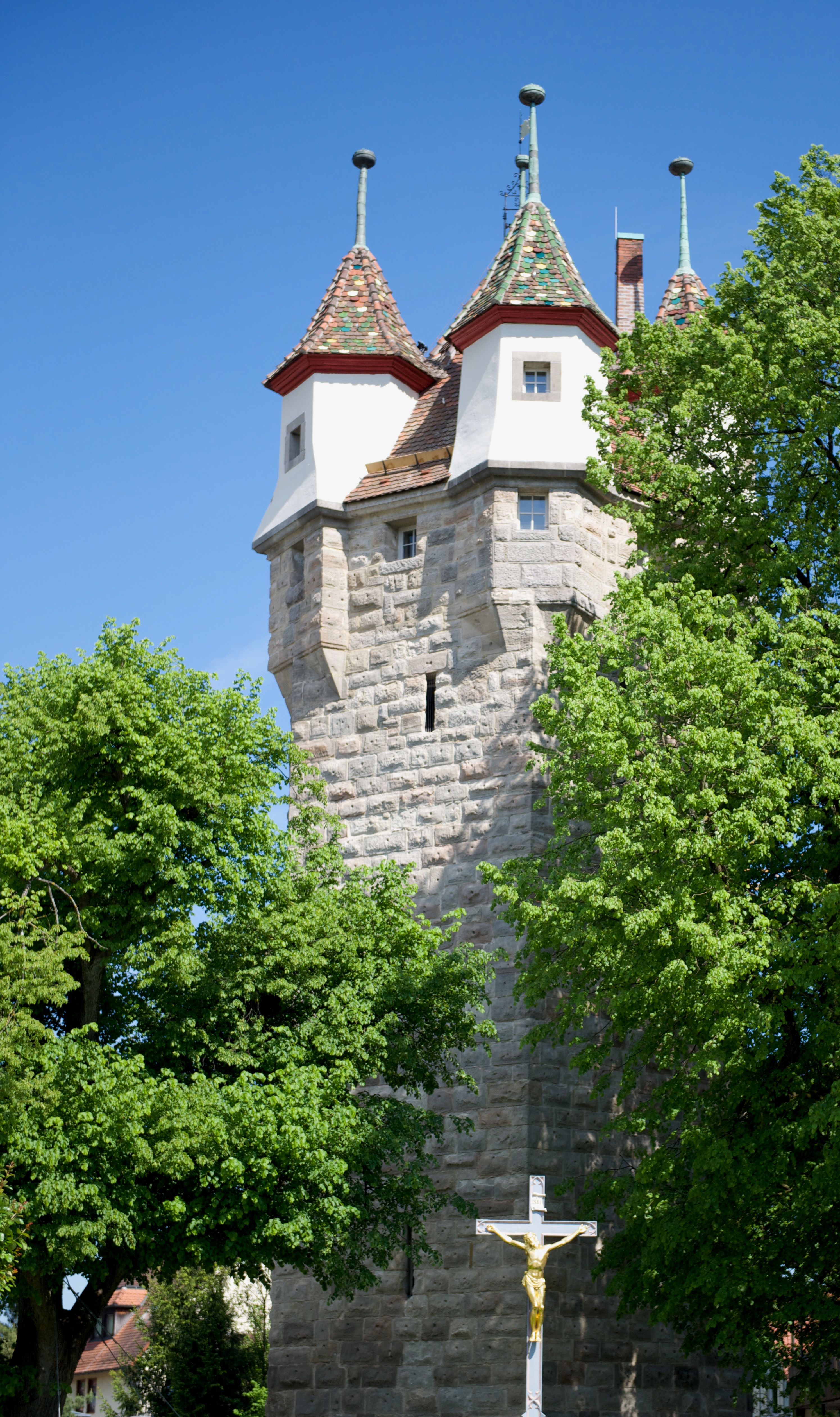 Fünfknopfturm in Schwäbisch Gmünd nach Renovierung 2013/14